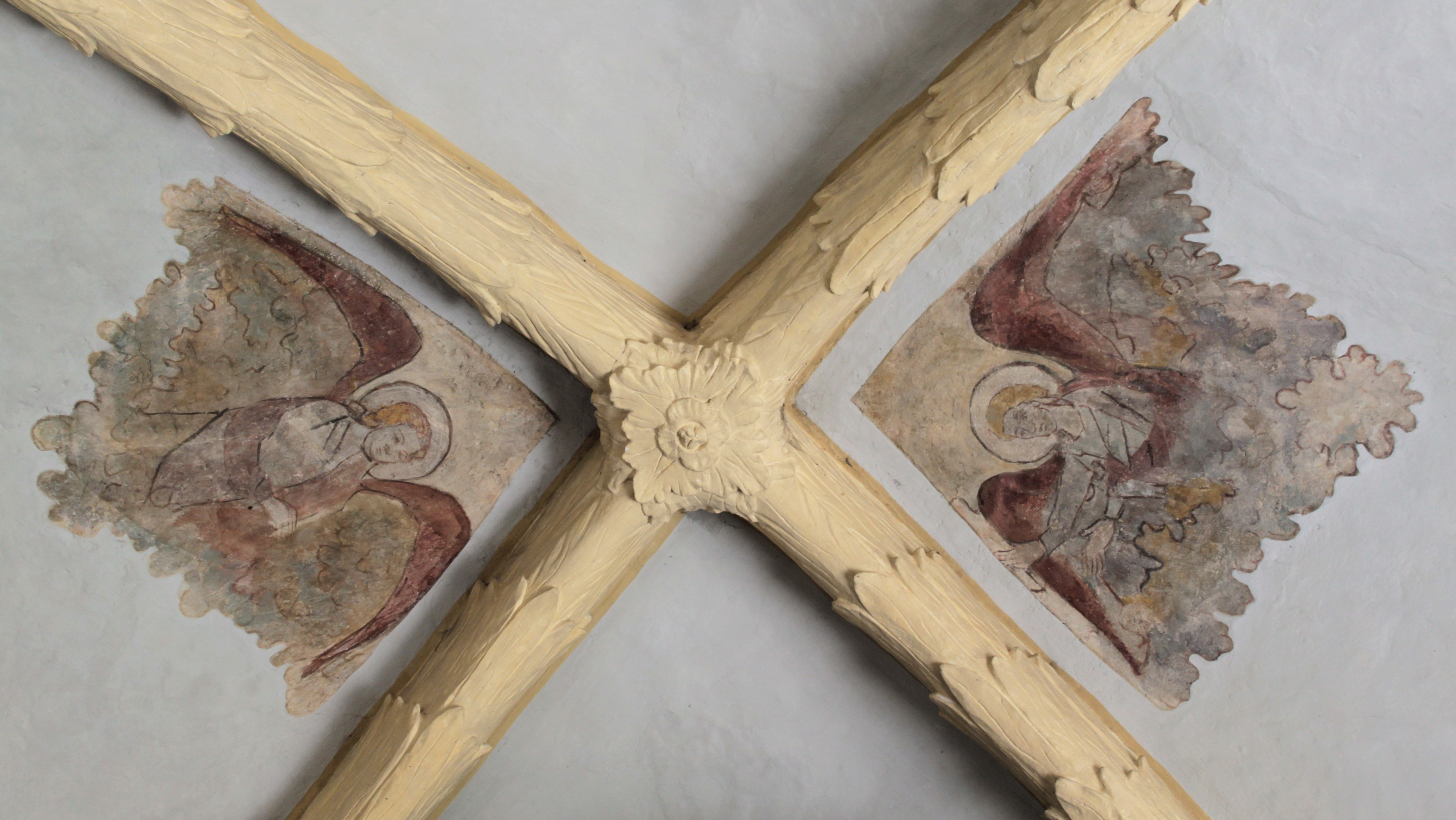 St. Johanniskirche, Deckenmalerei aus dem späten 15. Jahrhundert